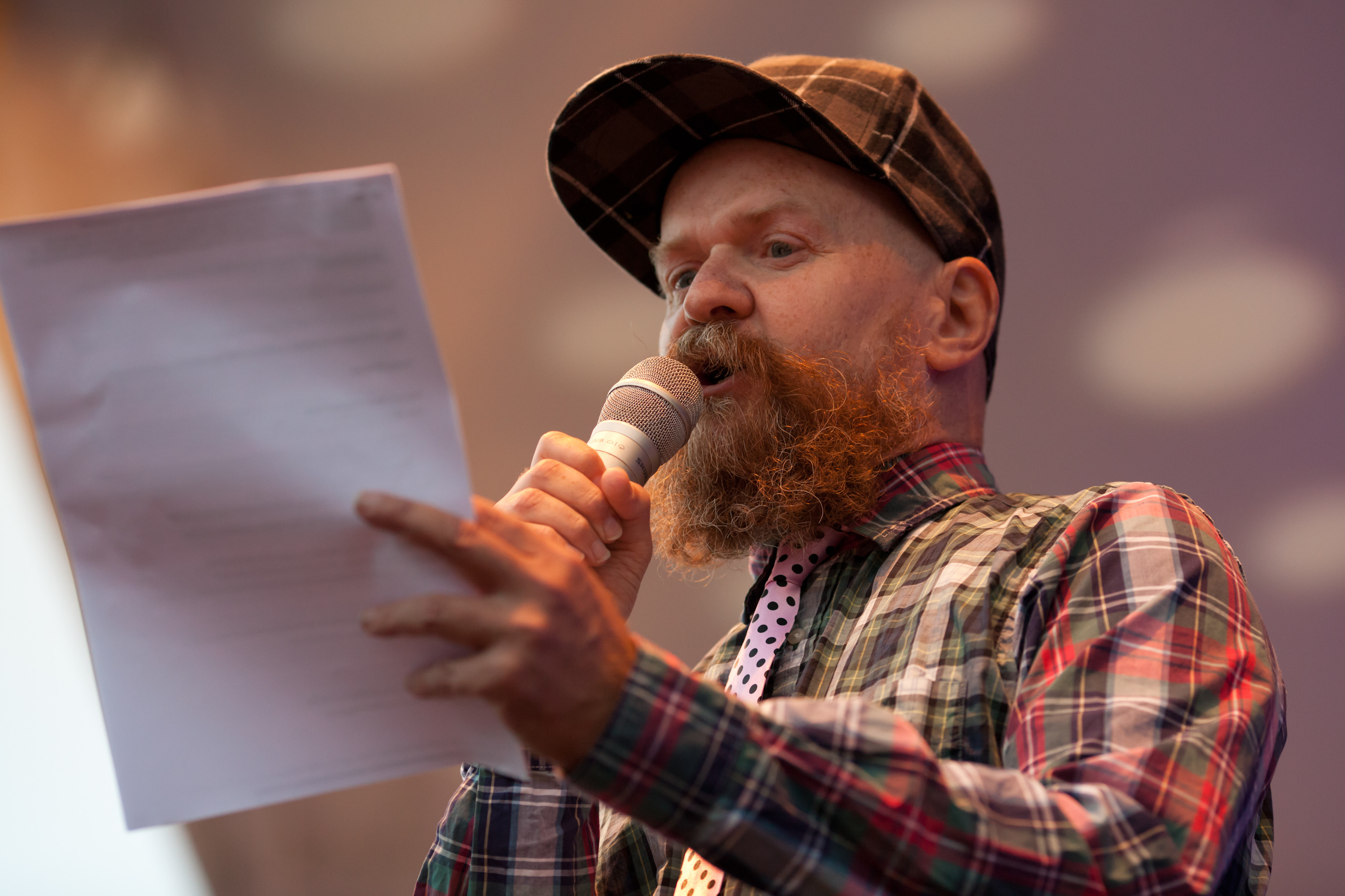 Alexander Bard håller tal på Stockholm Pride 2013.